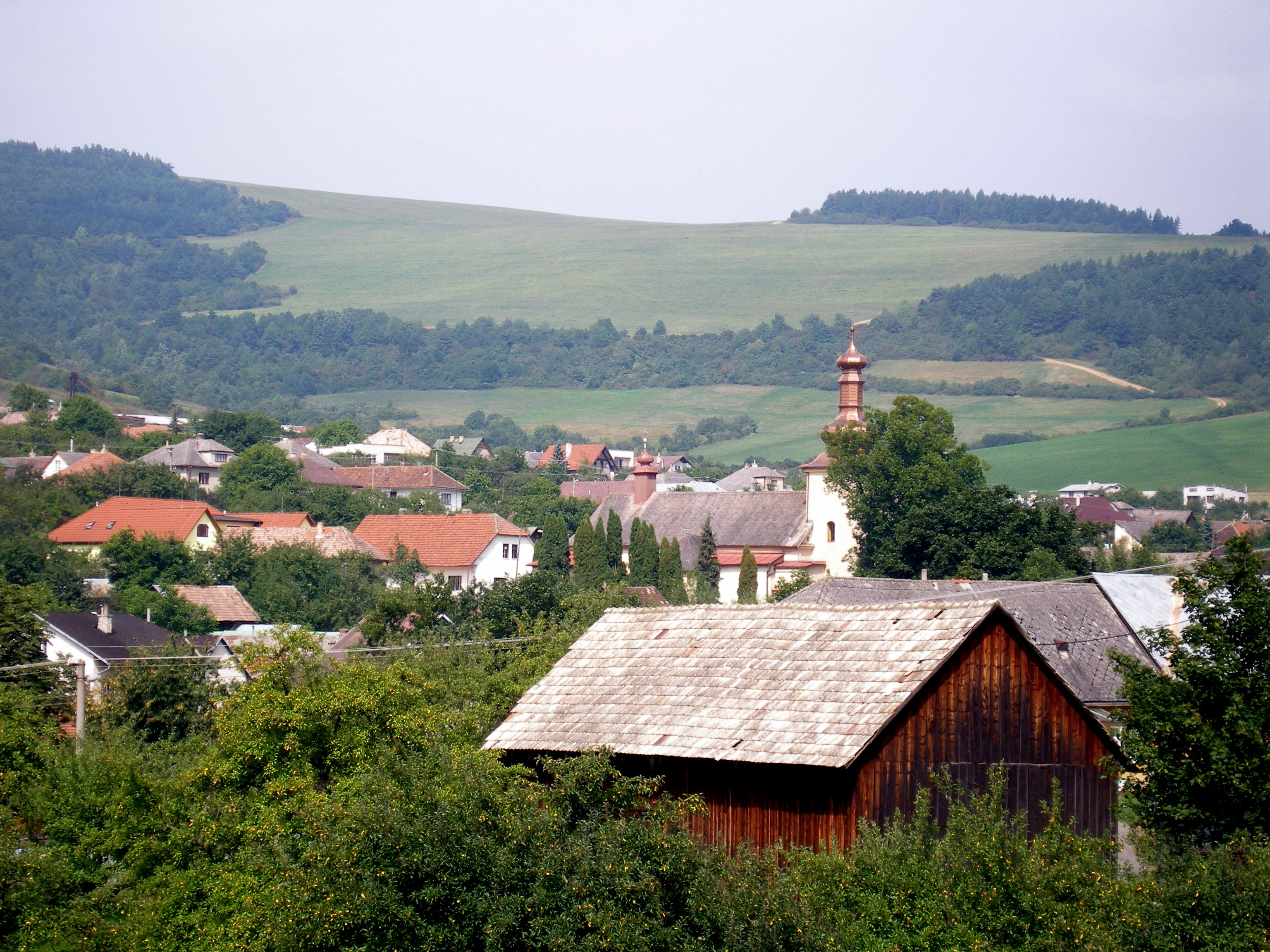 Šarišská obec Hermanovce